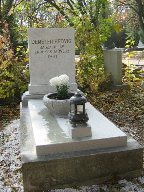 Demeter Hedvig (Budapest, 1926. szeptember 12. – Miskolc, 1981. június 8.) színésznő sírja Budapesten. Farkasréti temető: 36/2-1-135